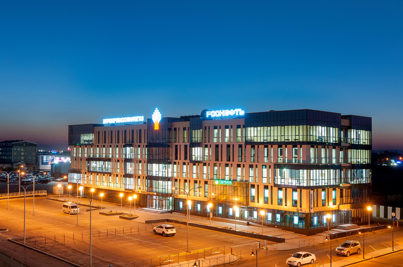 БЦ "Вега"